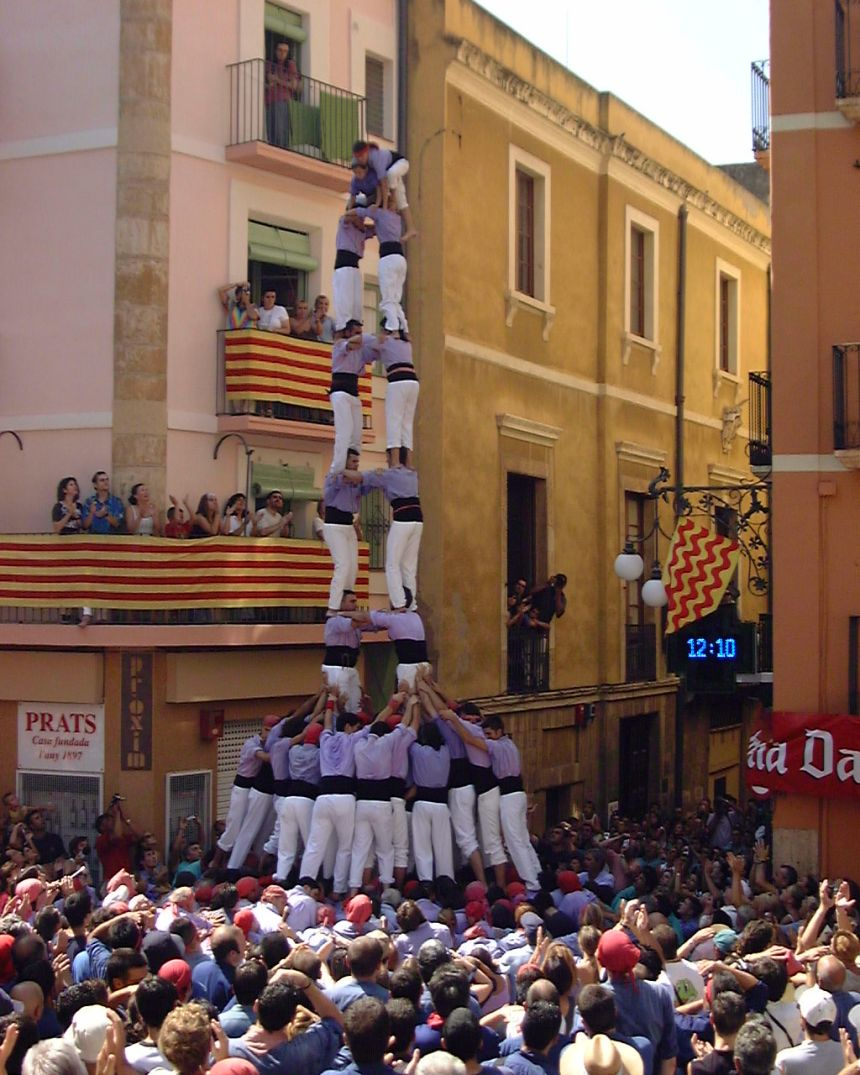 "Castellers" in Tarragona / Spanien